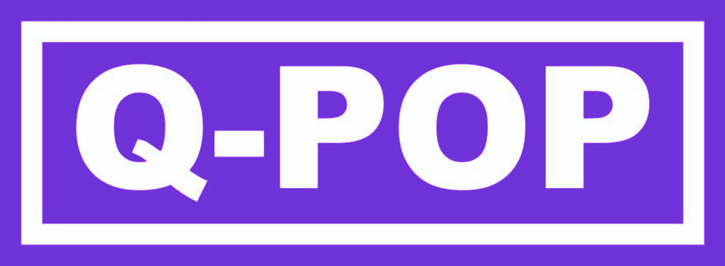 Картинка для музыкального жанра Q-pop (Qazaq pop)